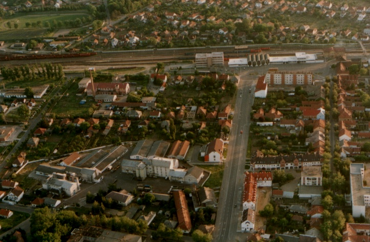 Mátészalka légi felvételen. Előtérben a város négysávos útja a vasútállomással, a vasút mögött az Újtelep és a sportpálya